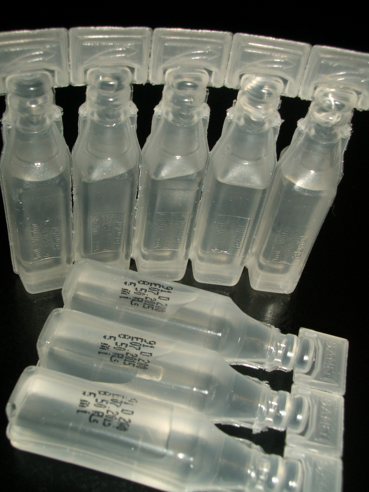 آب مقطر استریل شده جهت تزریقات